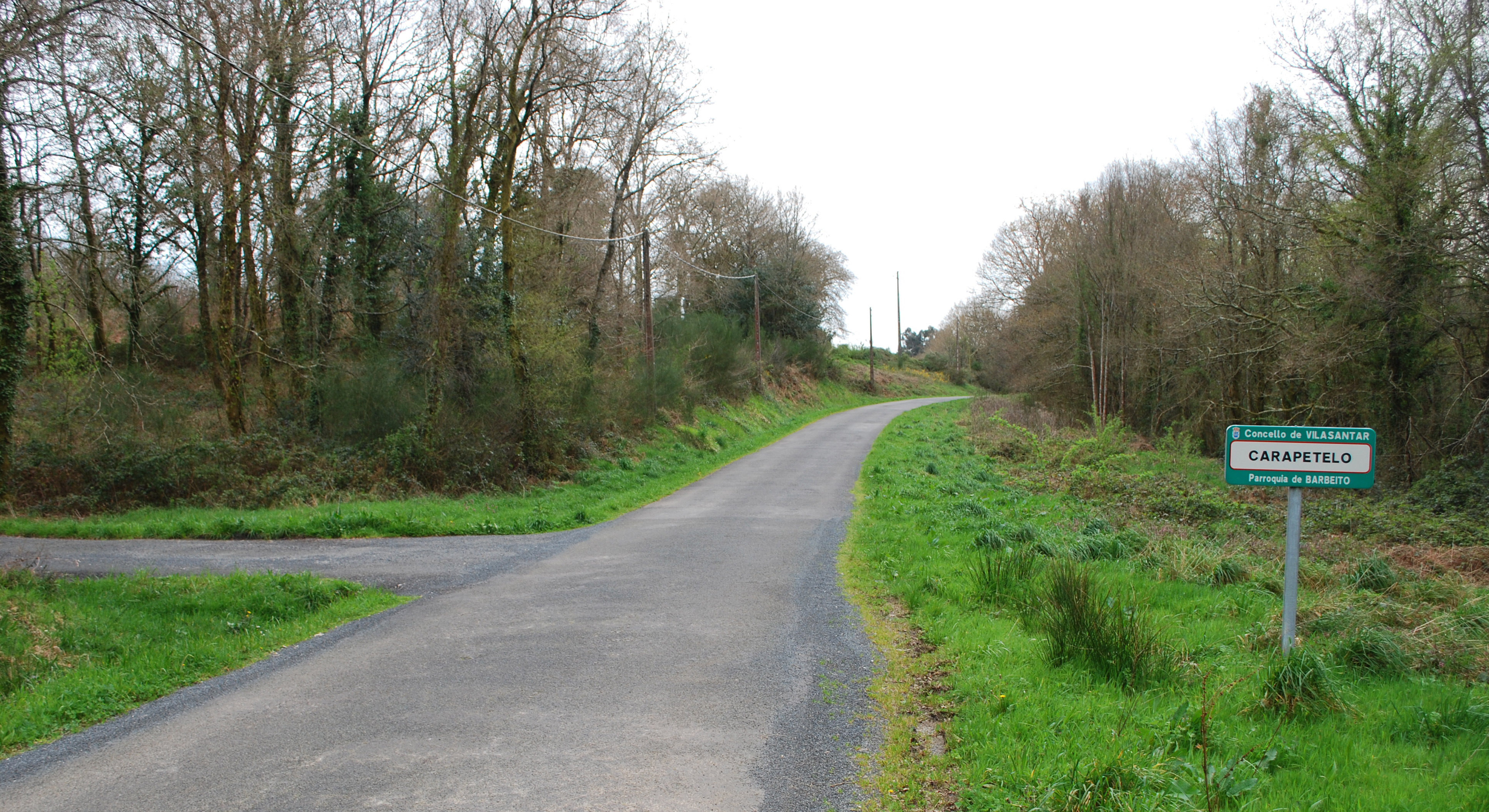 Acceso a Carapetelo en Barbeito concello de Vilasantar A Coruña Galiza